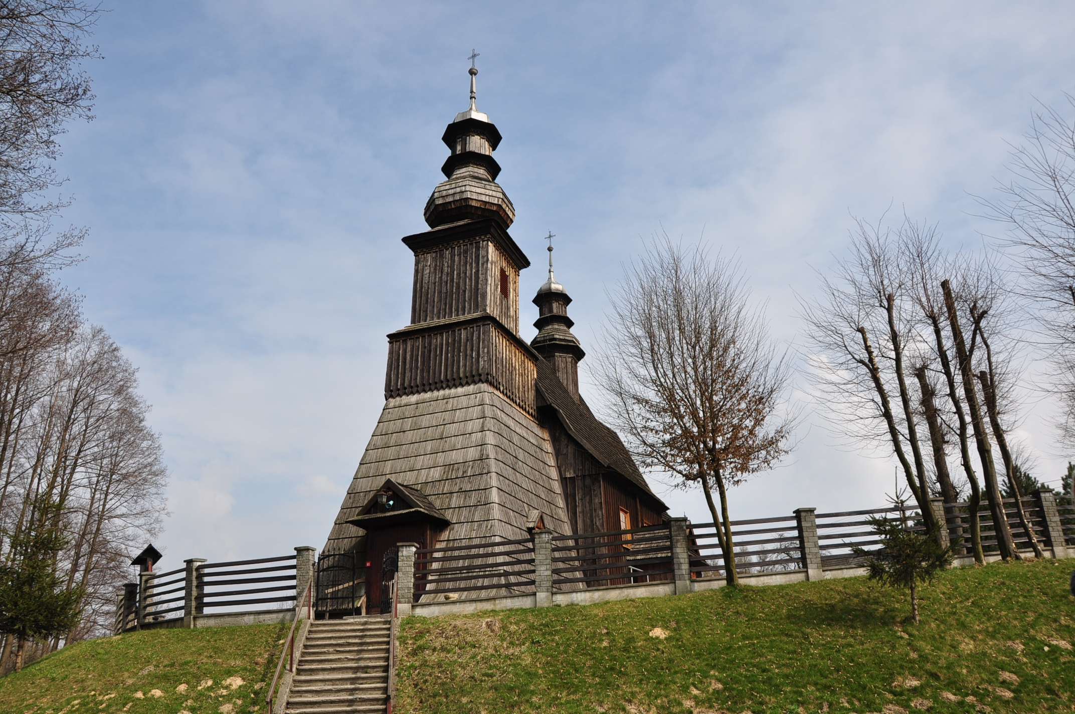 Graboszyce. Kościół p.w. św. Andrzeja.